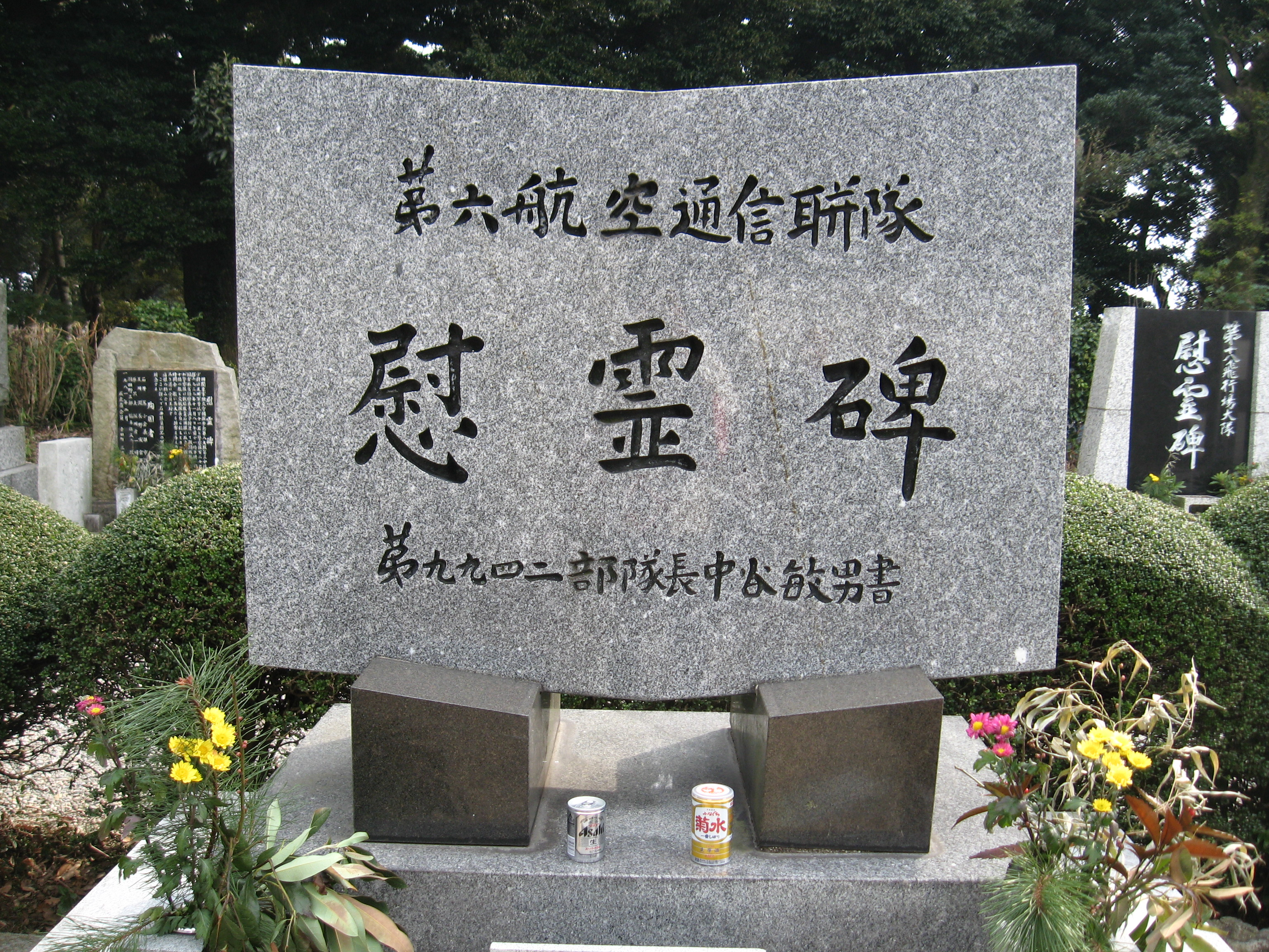 比島観音境内の慰霊碑